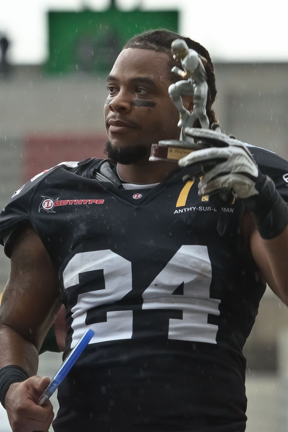 Stephen Yepmo (running back, Black Panthers de Thonon-les-Bains), vainqueur du Trophée Laurent Plegelatte (meilleur joueur Français) du championnat de France de football américain 2014.